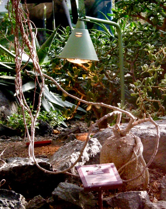 Zu den Seidenpflanzengewächsen (Asclepiadoideae) zählende Fockea capensis im Sonnenuhrhaus (Wüstenhaus) in Schönbrunn, angeblich älteste in gärtnerischer Pflege befindliche sukkulente Pflanze der Welt. Sie stammt vom Aufenthalt der kaiserlichen Gärtner Franz Boos (1753–1832) und Georg Scholl (1751–1831) in der niederländischen Kapkolonie in den Jahren 1786 bis 1788 bzw. 1799.